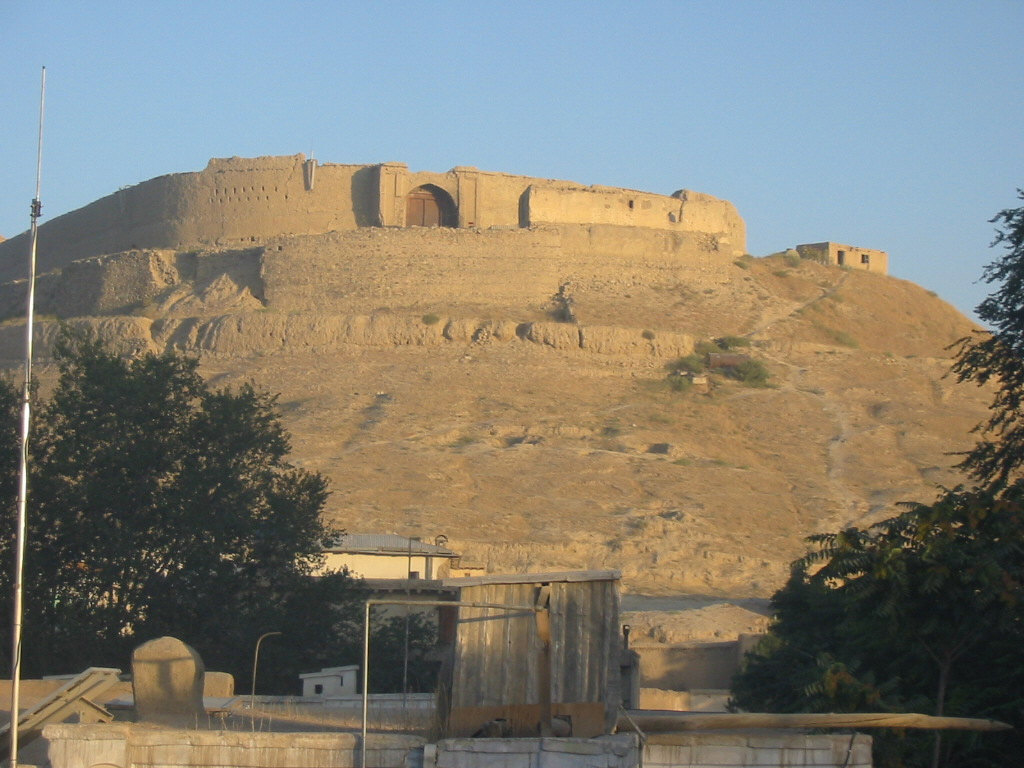 Fort Kabul